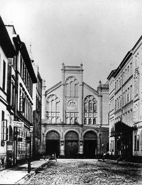 Blick in der zweiten Hälfte des 19. Jahrhunderts durch die Rosenstraße auf den in der Artilleriestraße von Ludwig Droste 1861 bis 1864 errichteten Neuen Packhof ...